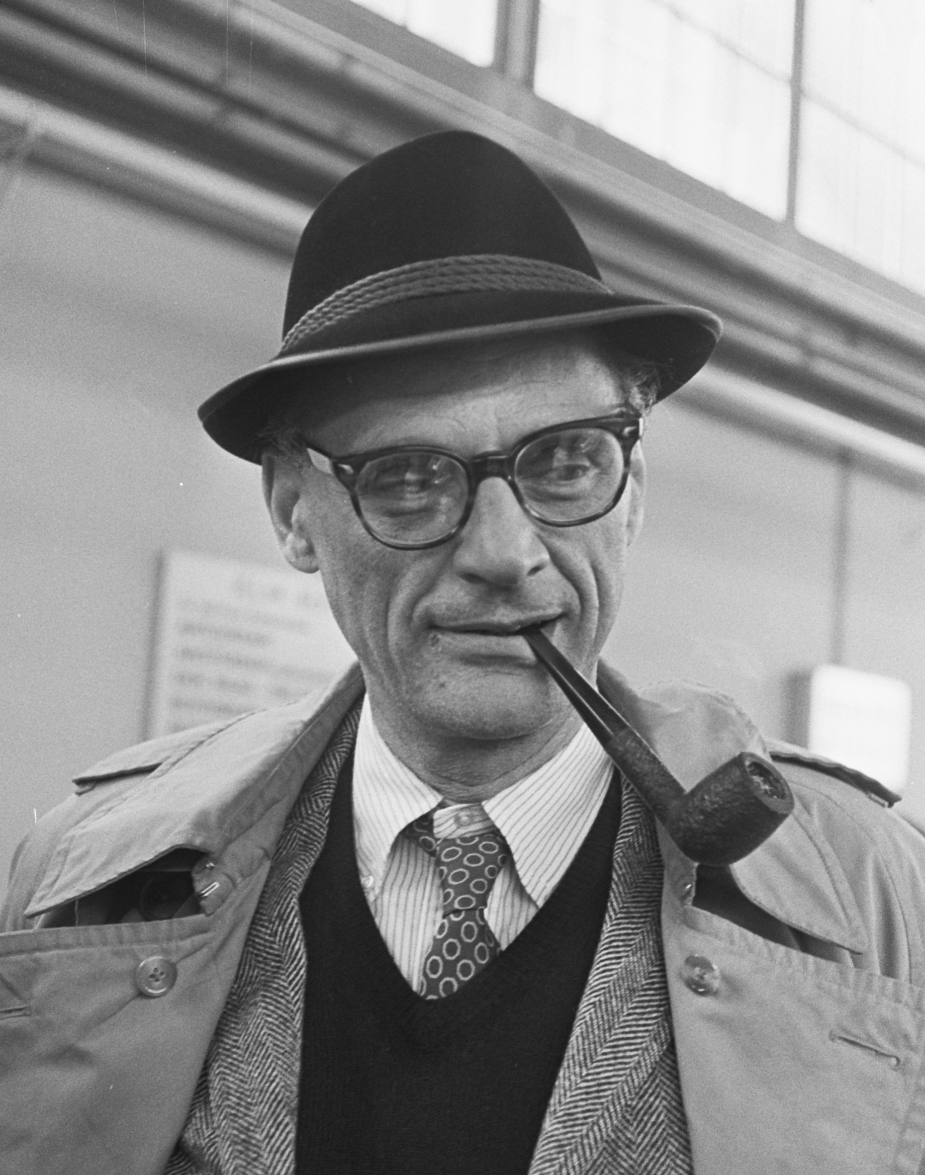 De Amerikaanse toneelschrijver Arthur Miller op Schiphol